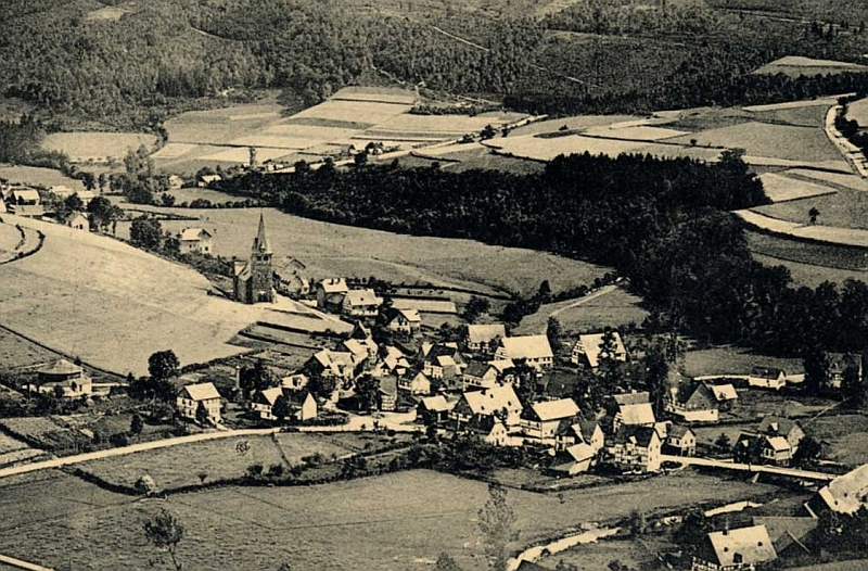 Fleckenberg im Sauerland (Germany/NRW), Anno 1912